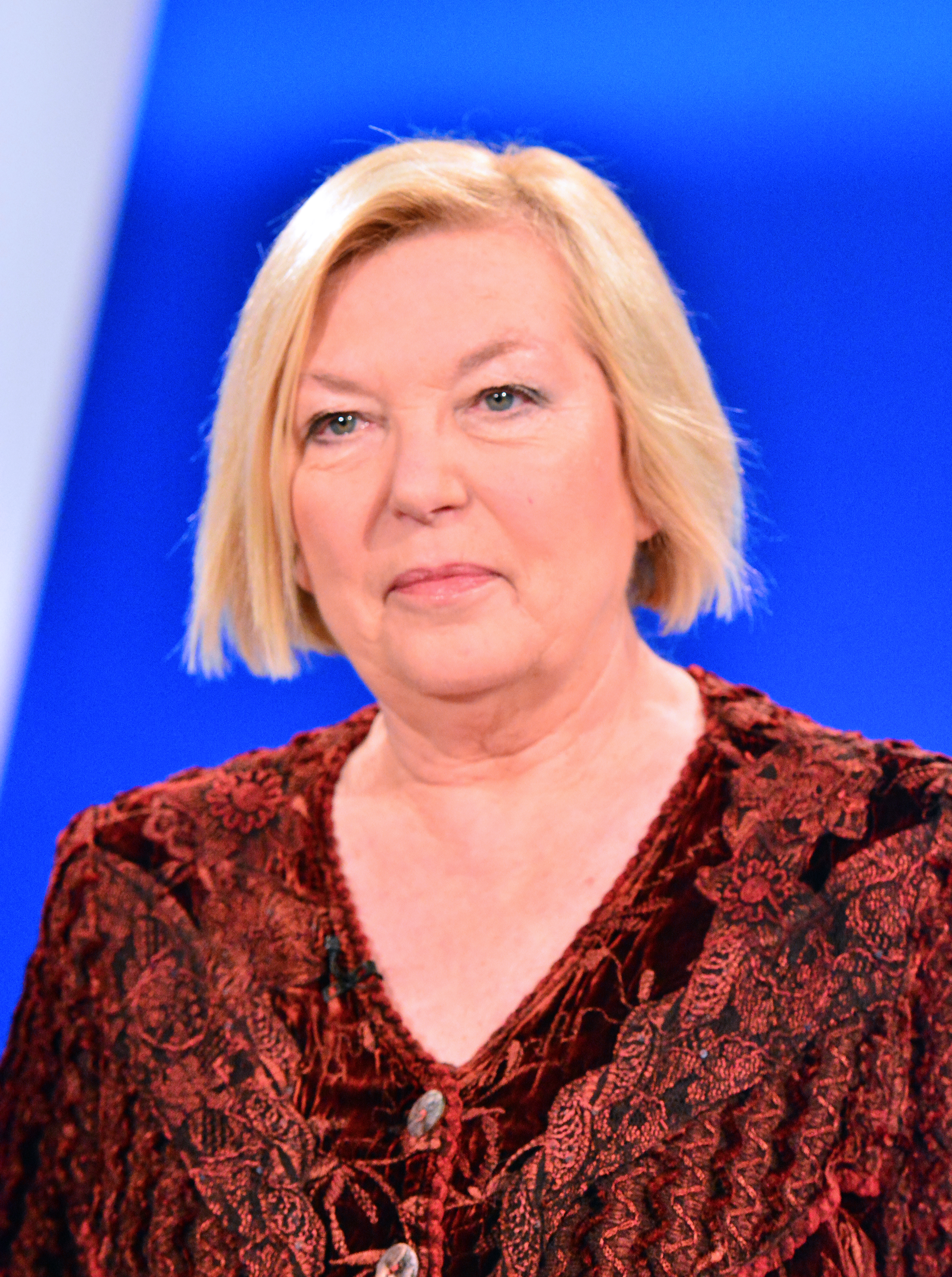 Die Politikerin und Spitzenkandidatin der Patei DIE LINKE für die Bürgerschaftswahl in Hamburg 2015 Dora Heyenn bei einem Fototermin in Hamburg.